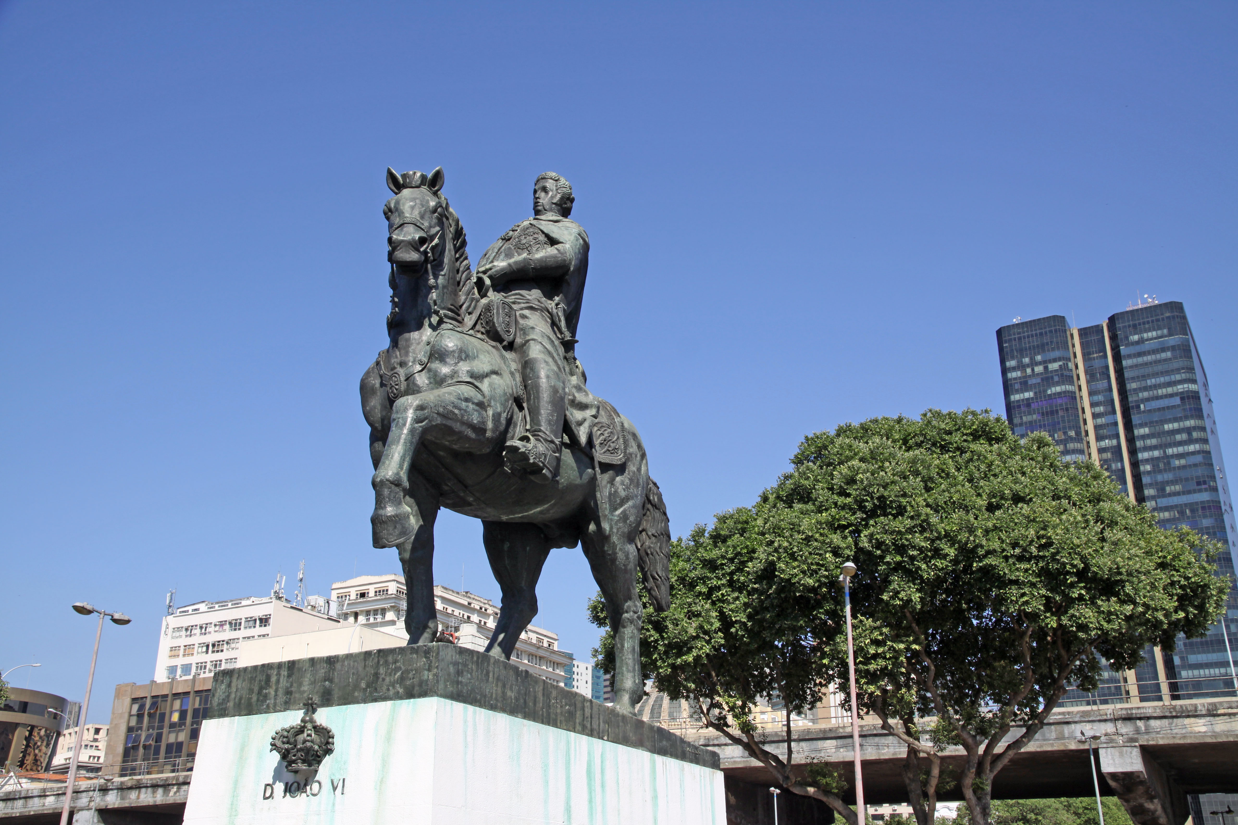 Estátua Equestre de Dom João VI na Praça 15 de Novembro